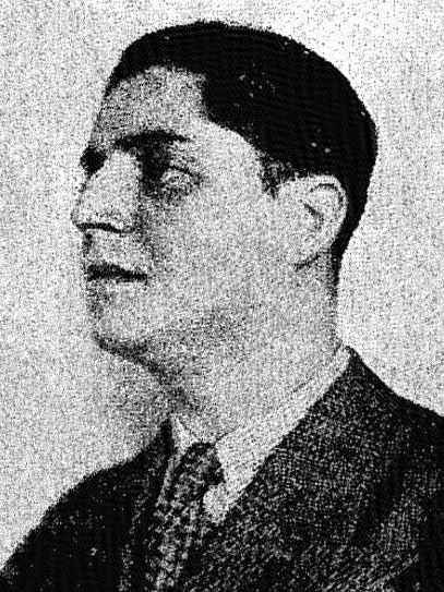 Roger de Saivre, président des Jeunesses nationales.